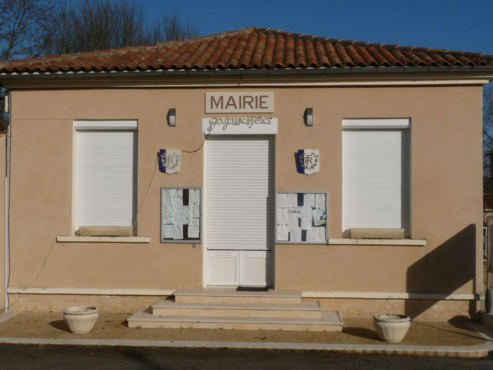 mairie de Souffrignac, Charente, France